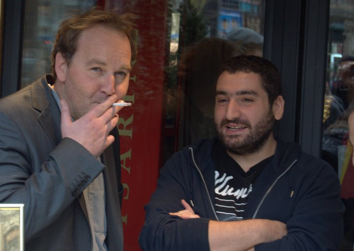 Xavier Beauvois et Mouloud Achour au déjeuner des nommés des César du cinéma